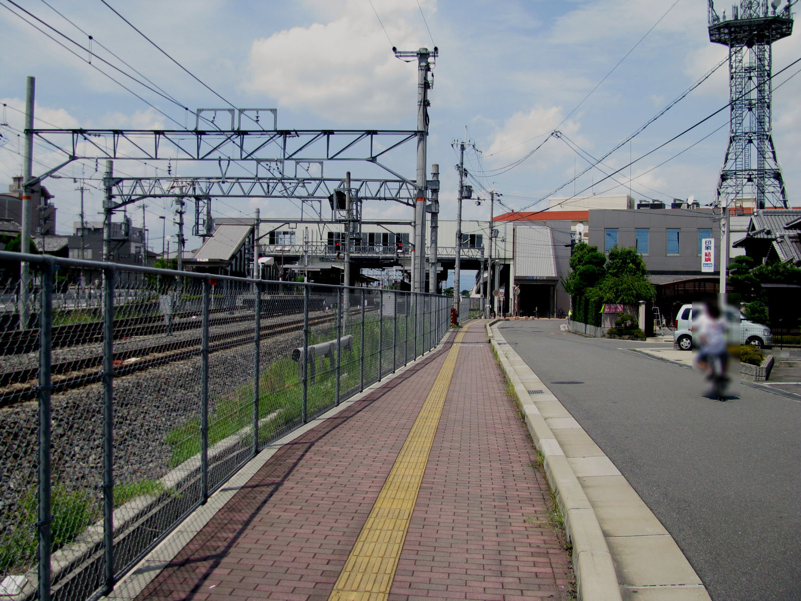 JR学研都市線京田辺駅